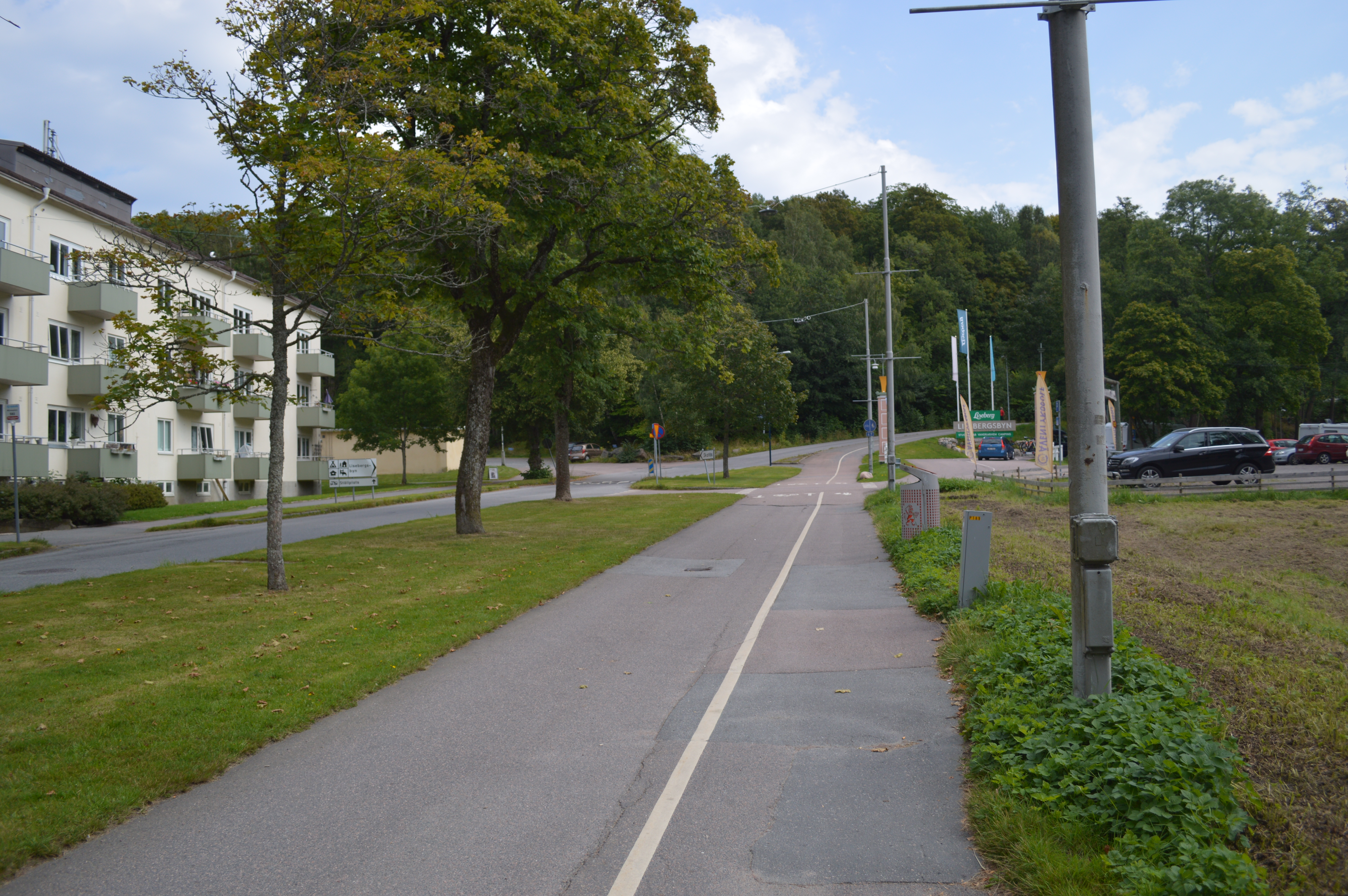 Här låg Kärralunds gård en gång i tiden